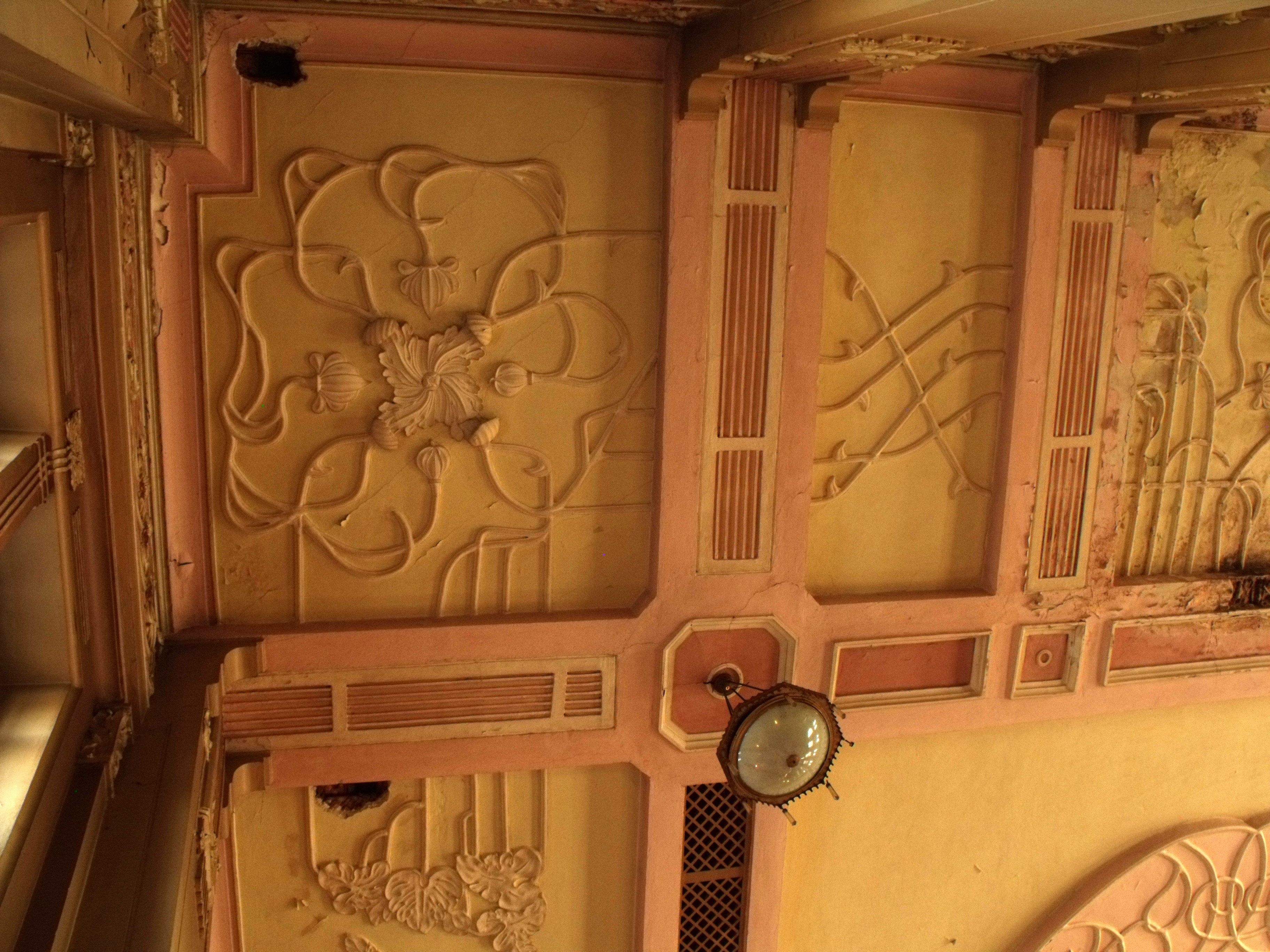 Залізничний вокзал: Вінницька область, м.Жмеринка